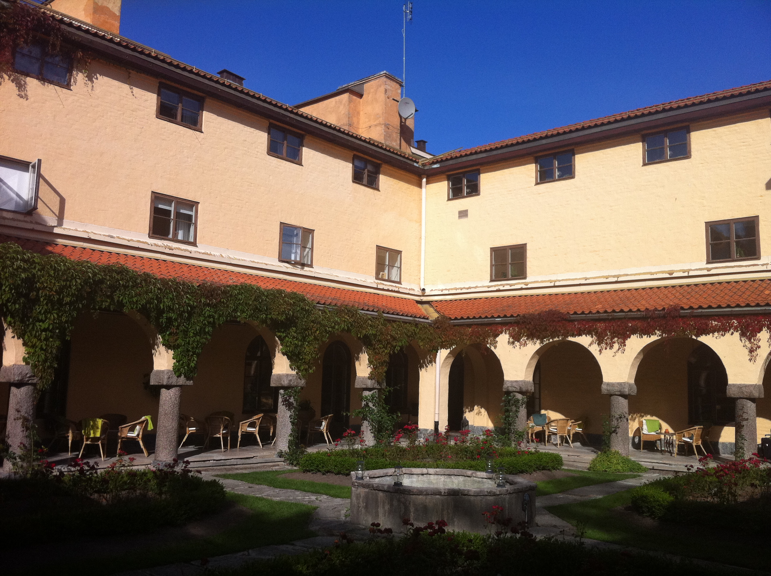 Sigtunastiftelsen, Sigtuna kommun